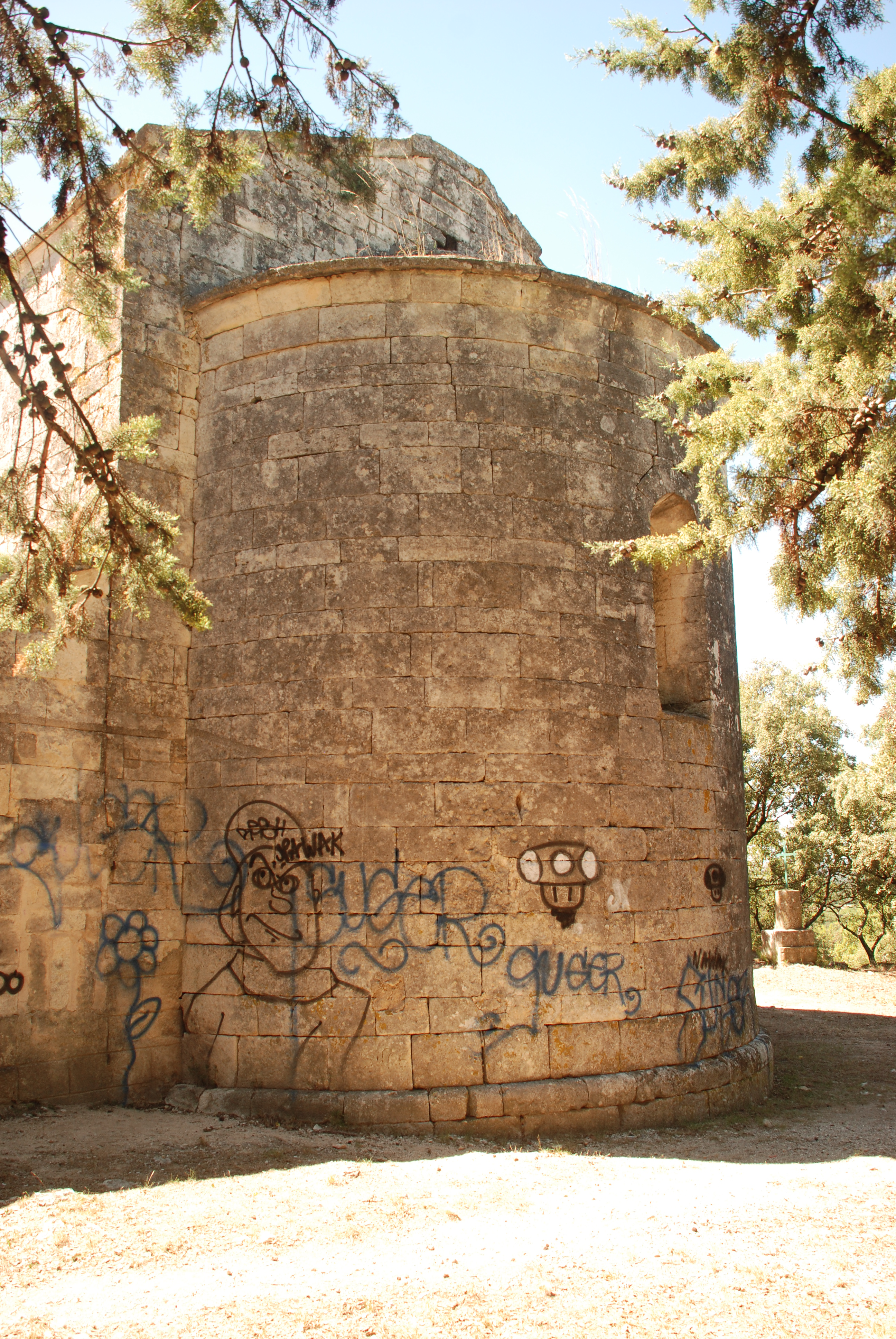 France - Hérault - Chapelle Notre-Dame-de-la-Pitié de Beaulieu